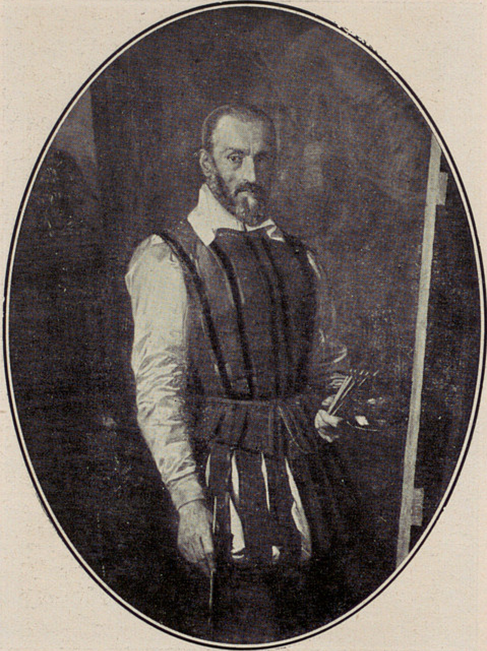 Lo pintor valencià Juan de Juanes, per Bernat Ferràndiz.